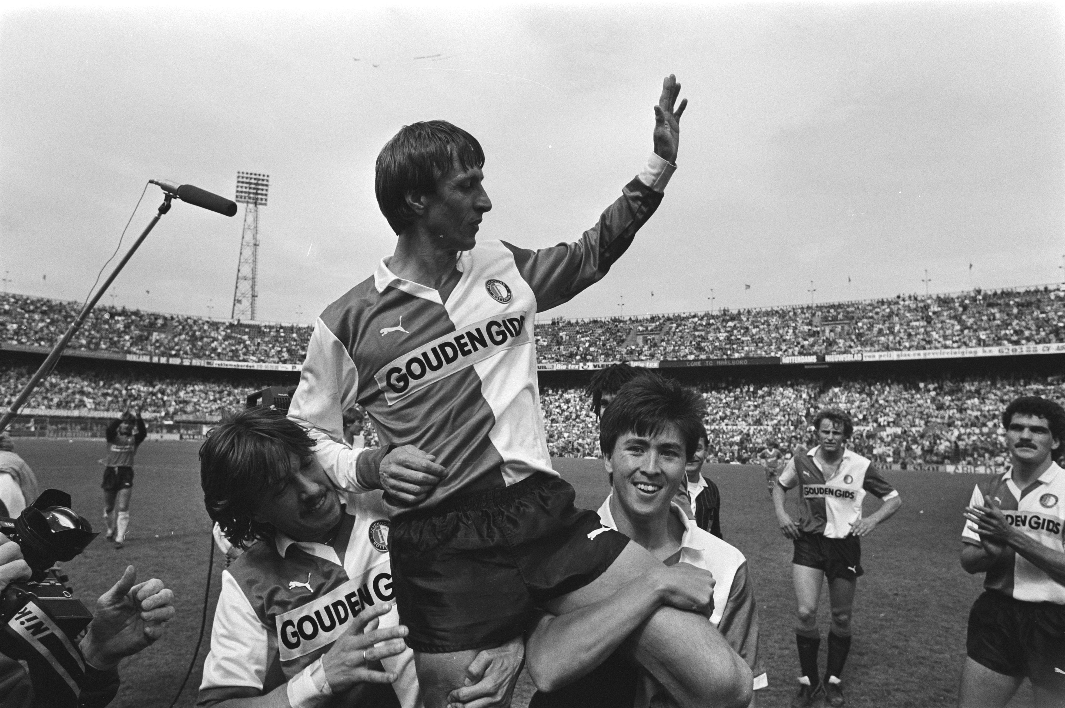 Feyenoord tegen PEC, met afscheid Johan Cruyff ; Johan Cruyff op de schouders van Wijnstekers en Brard.jpg